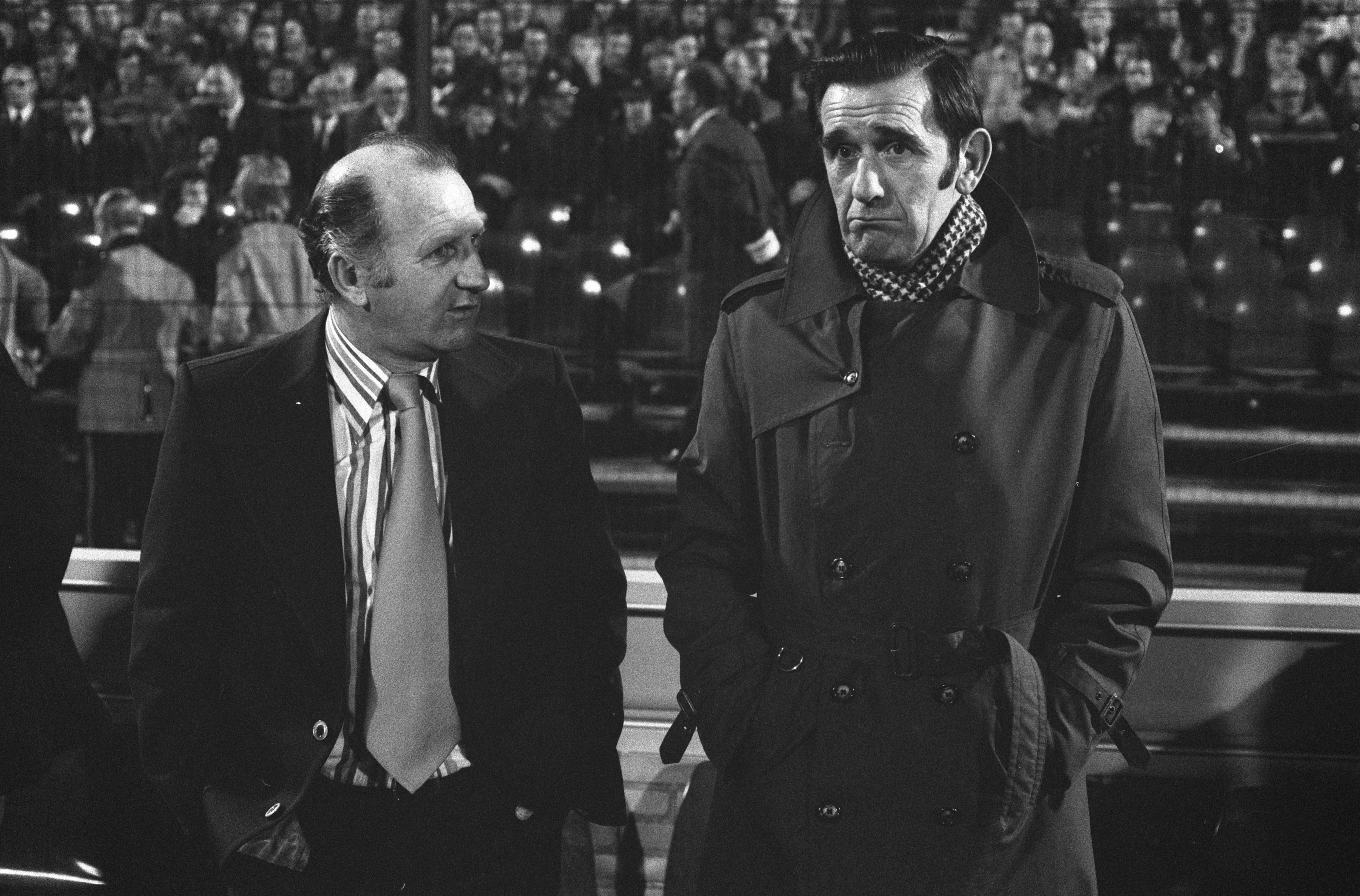 Demi-finale de la coupe KNVB de football Ajax - PSV (1-2) : discussion entre l'entraîneur du PSV Kees Rijvers (à gauche) et celui de l'Ajax George Knobel.